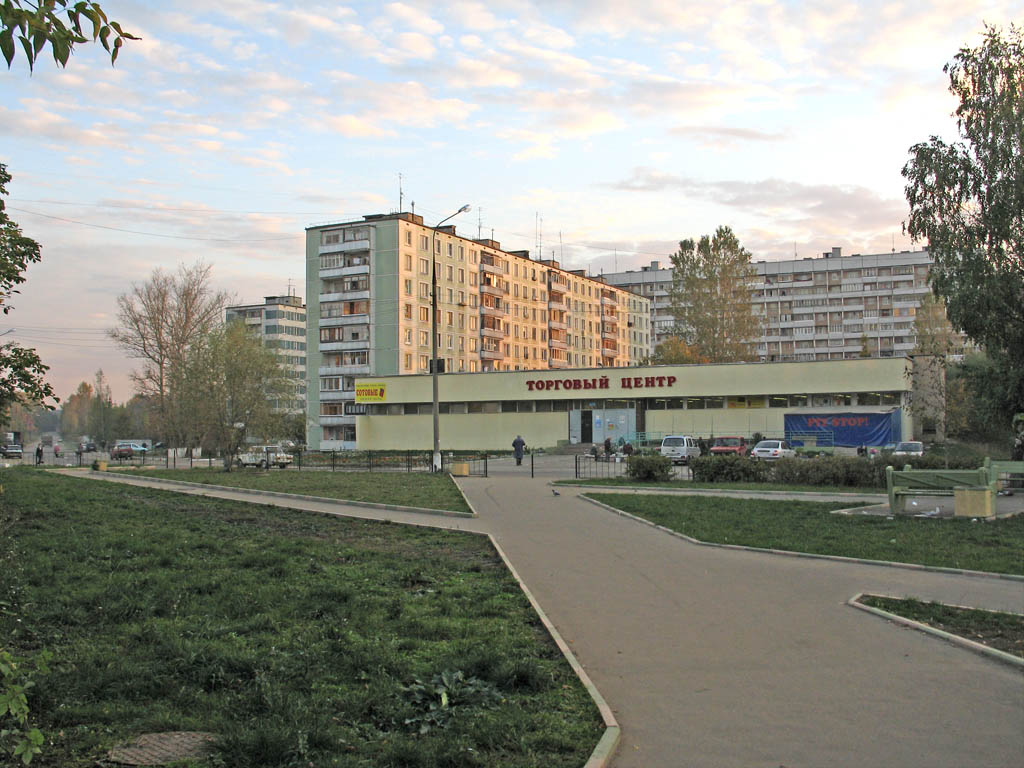 Кокошкино